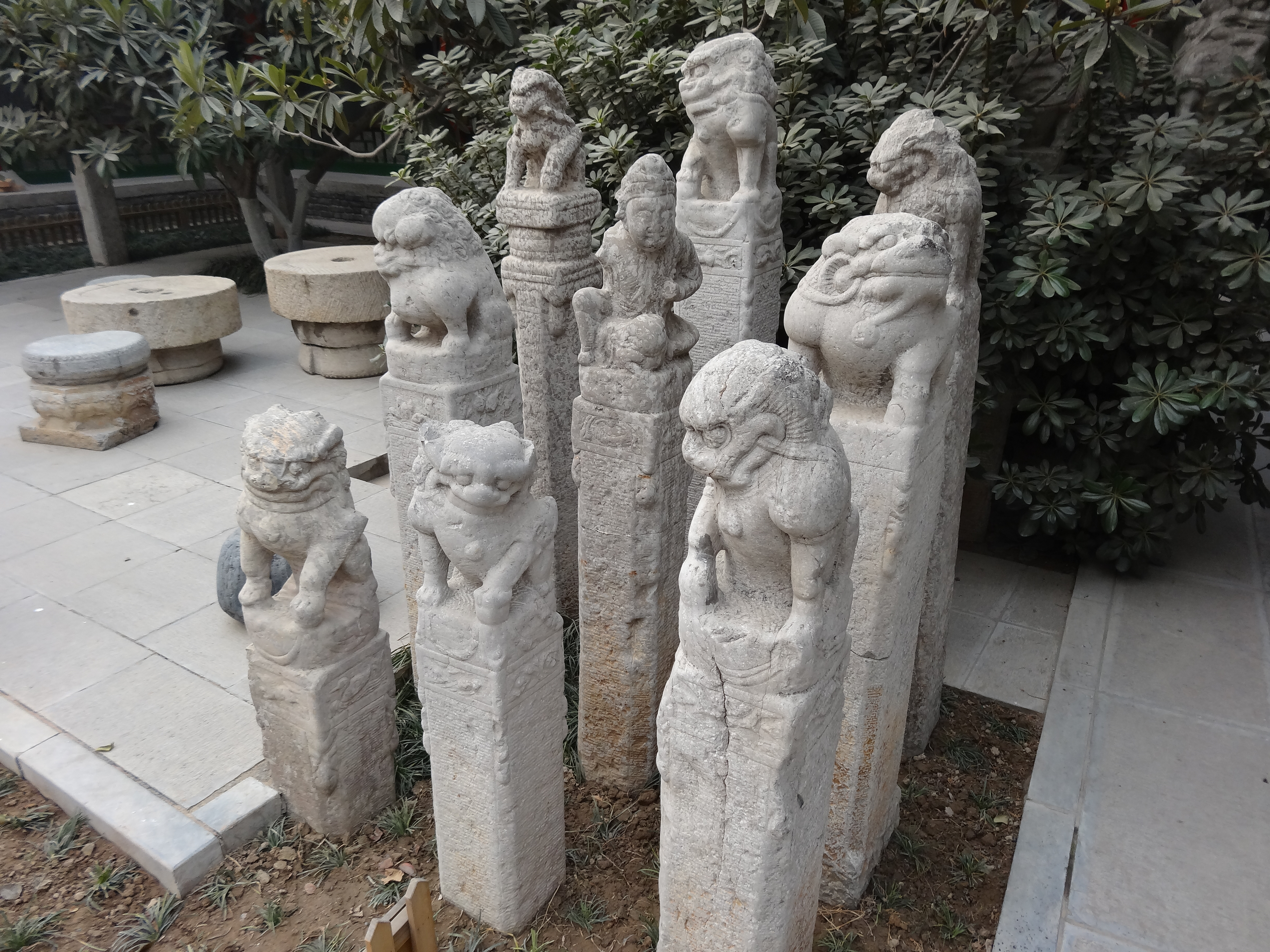 咸阳博物馆内收藏的拴马桩